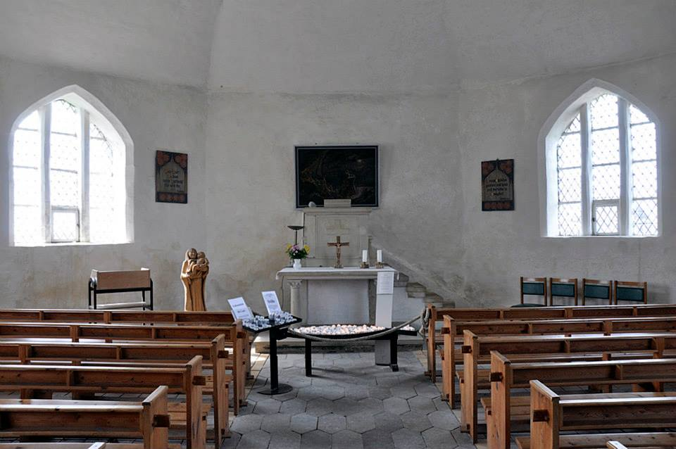 Kapelle Vitt auf Rügen, Innenraum